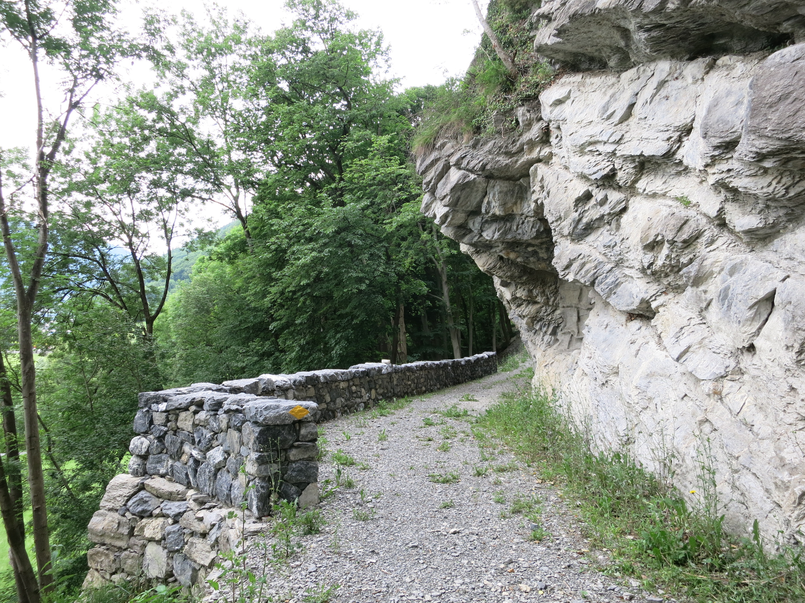 Alte Schollbergstrasse, Vild - Trübbach SG, Schweiz